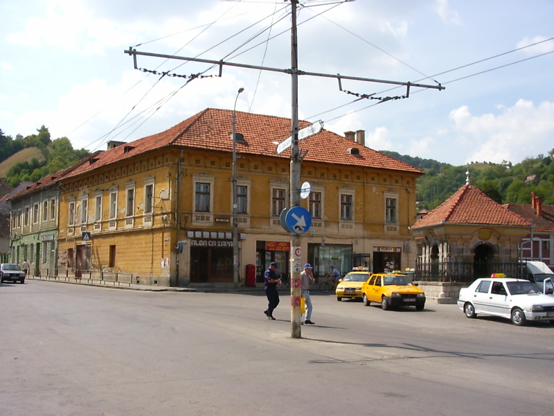 Prund (Pţa Unirii)